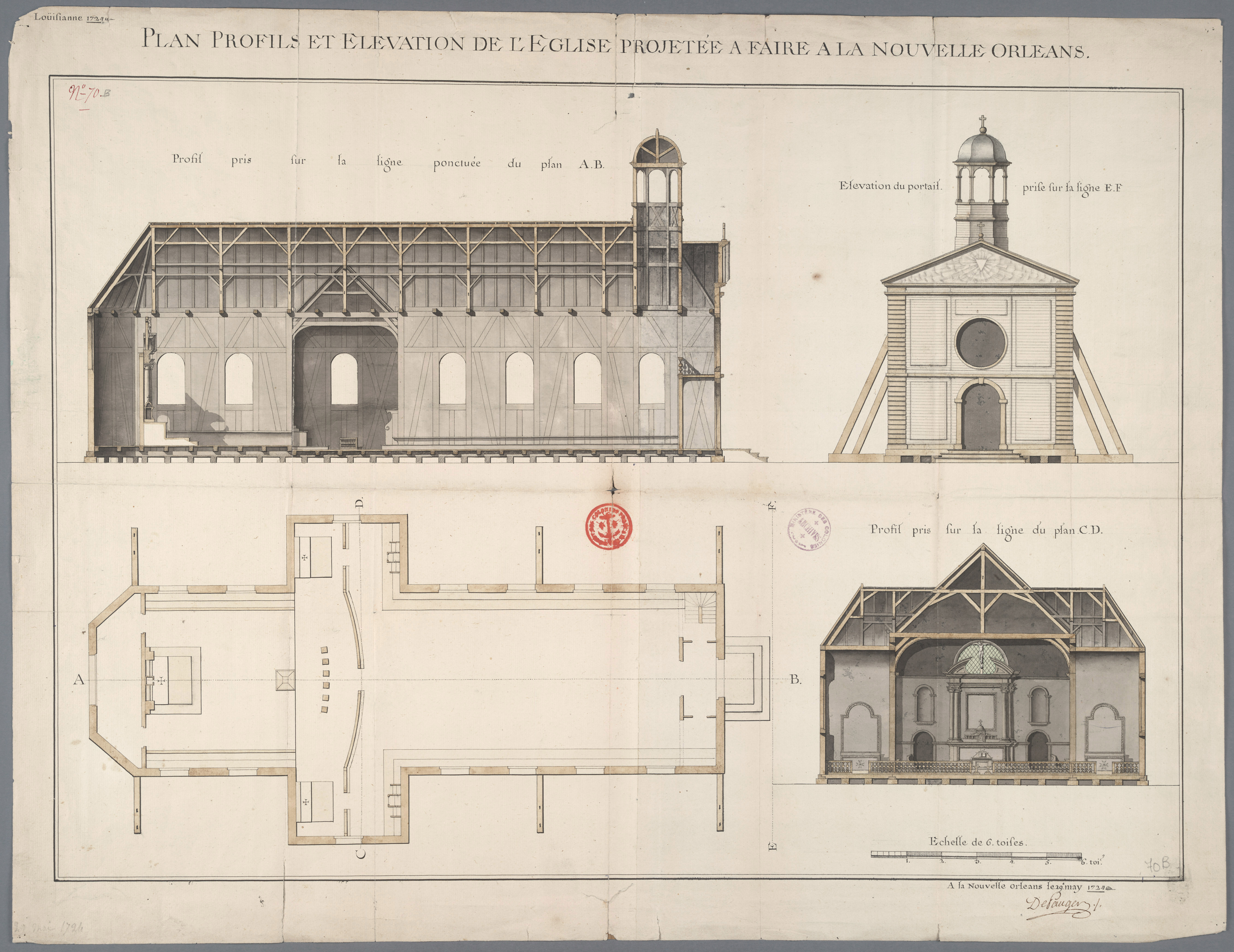 Plan profils et élevation de l'église projetée a faire a la Nouvelle Orléans.